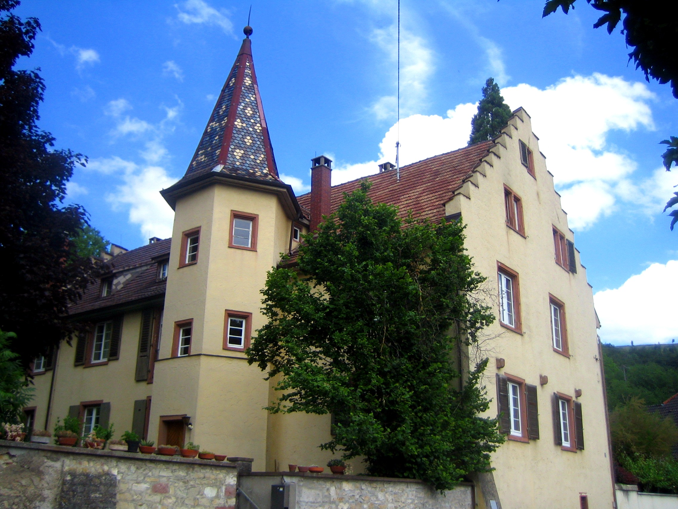 Schlösschen der Freiherren von Freystedt in Istein (ehemaliger Dinghof des Domkapitels Basel und heutiges Weingut)